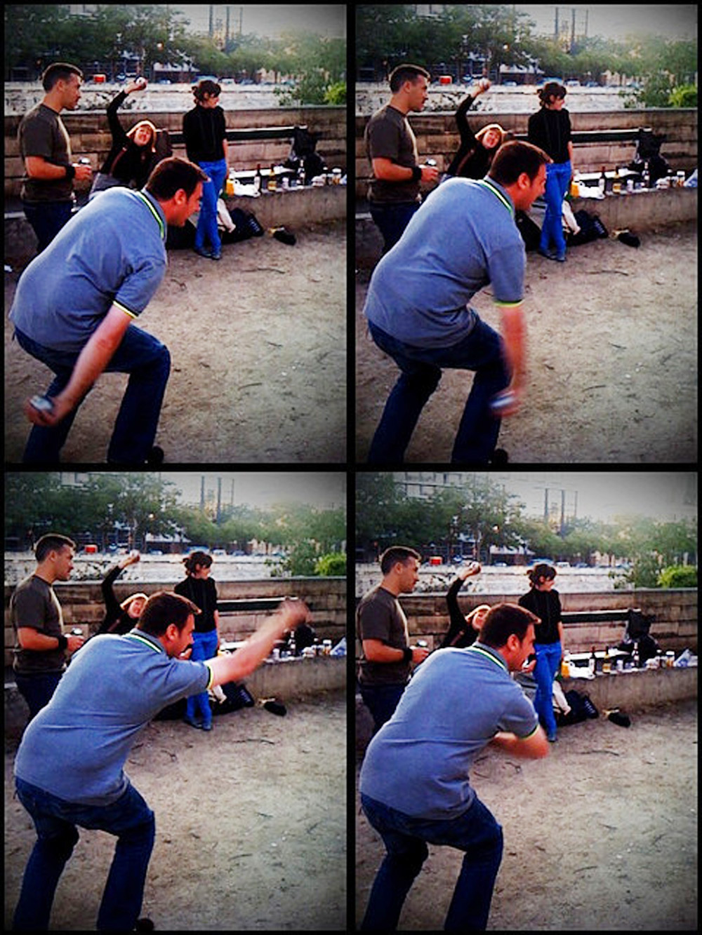 Décomposition de la façon de tirer à la pétanque